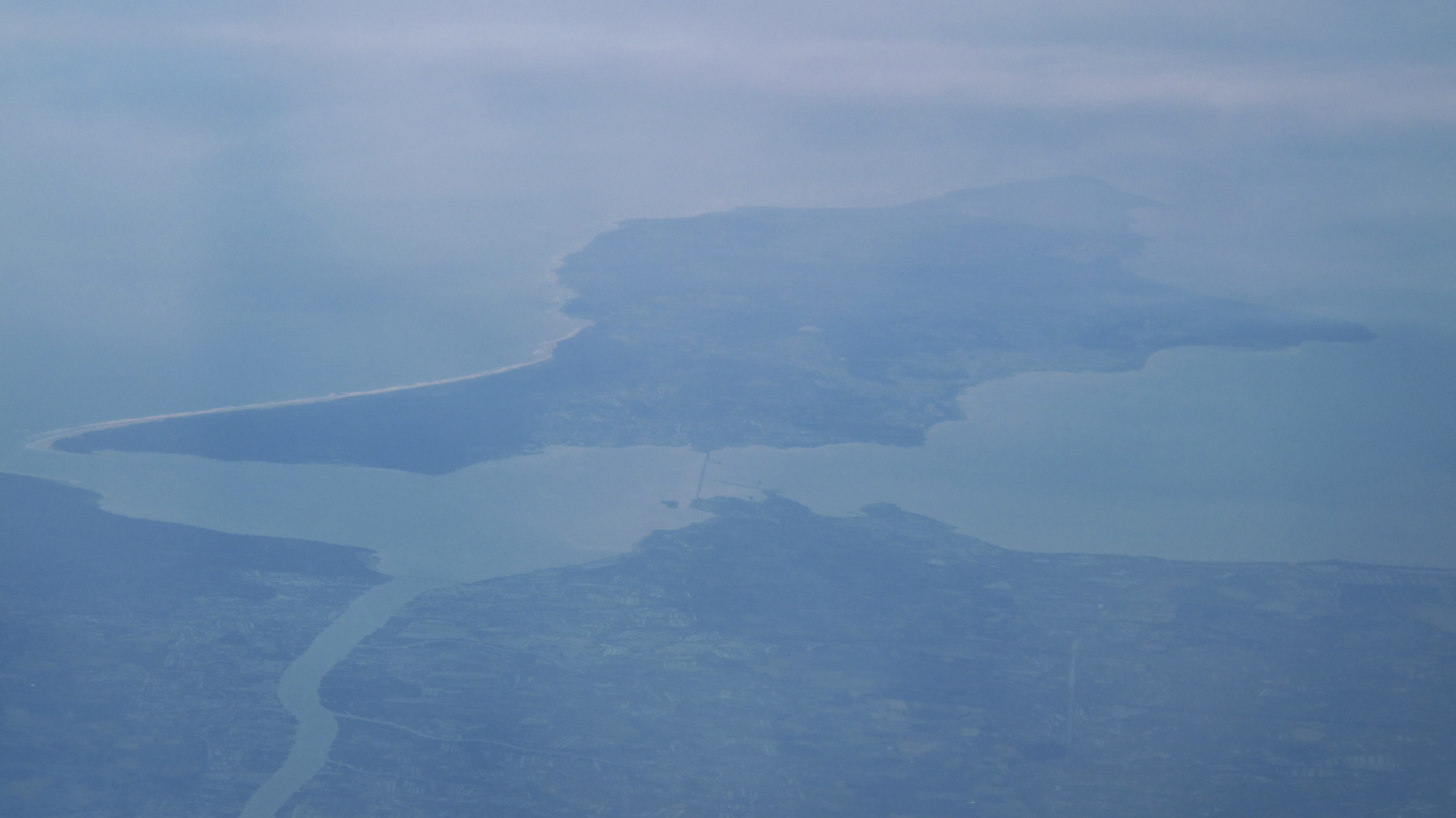 L'île d'Oléron, face à l'estuaire de la Seudre (Charente-Maritime, France)